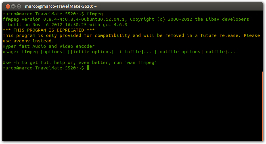 Warnung, auf Libav umzusteigen